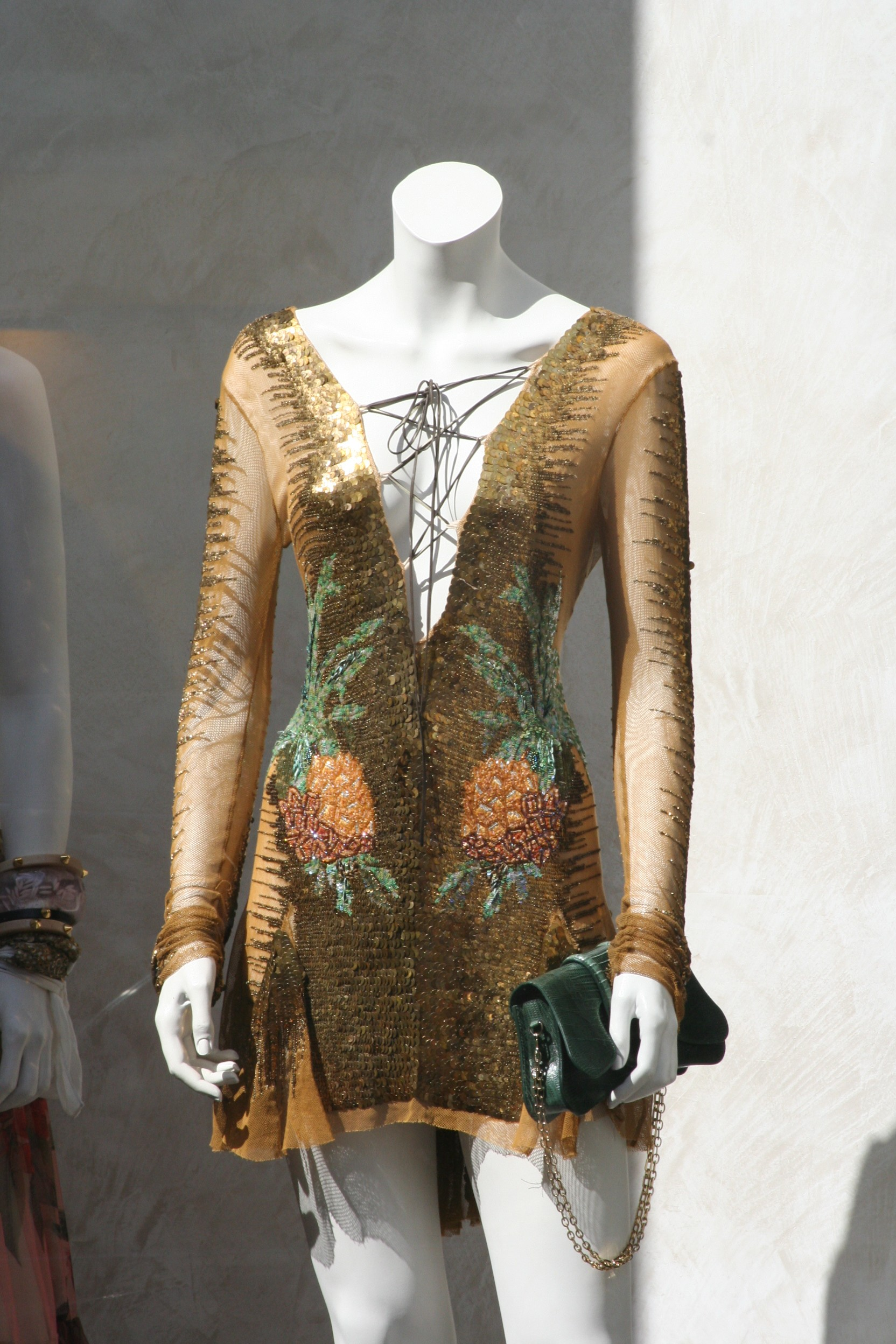 Eine Schaufensterpuppe in Athen